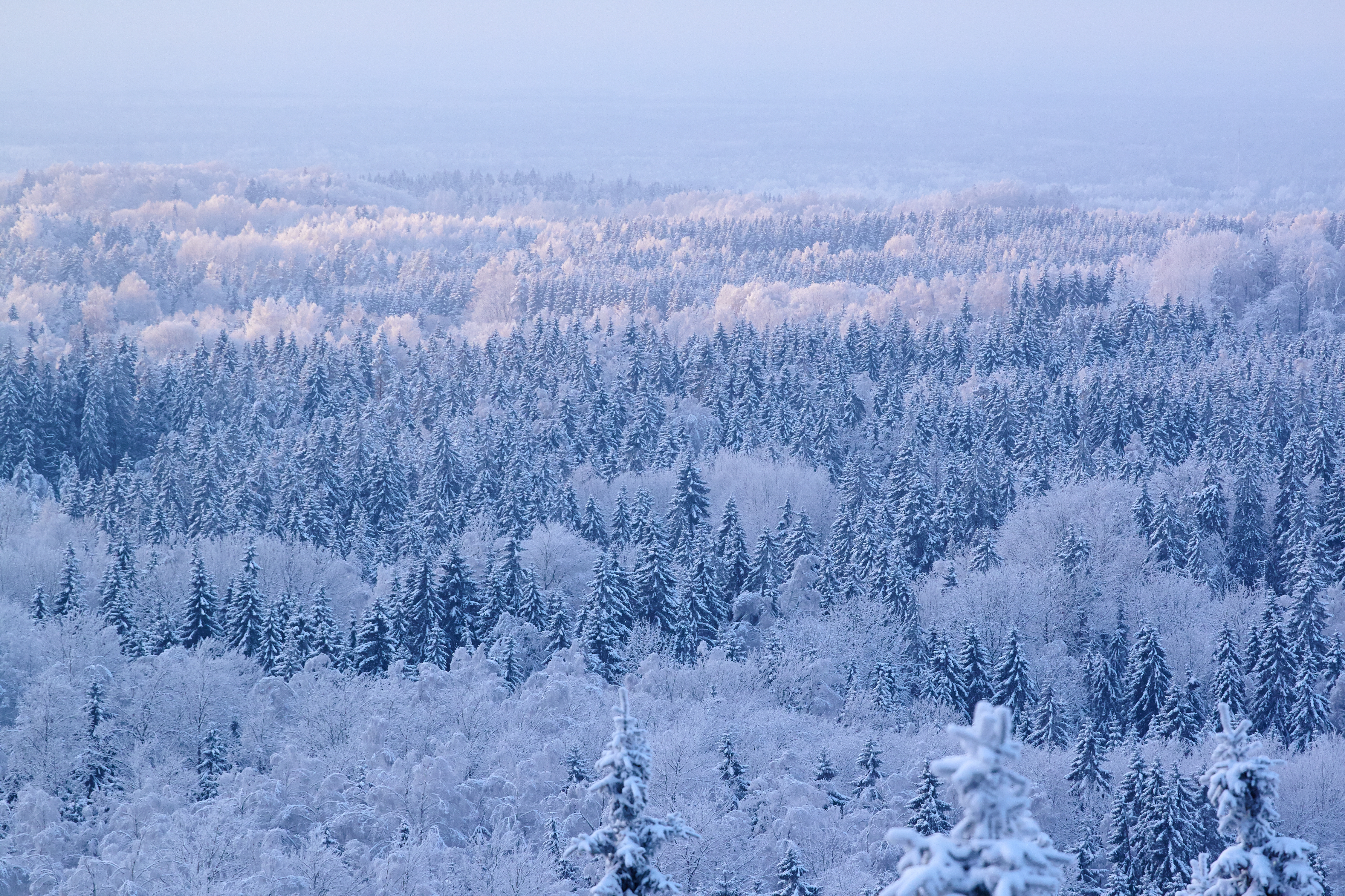 Vaade Haanja kõrgustikule Suure Munamäe vaatetornist 2010. aasta jaanuaris